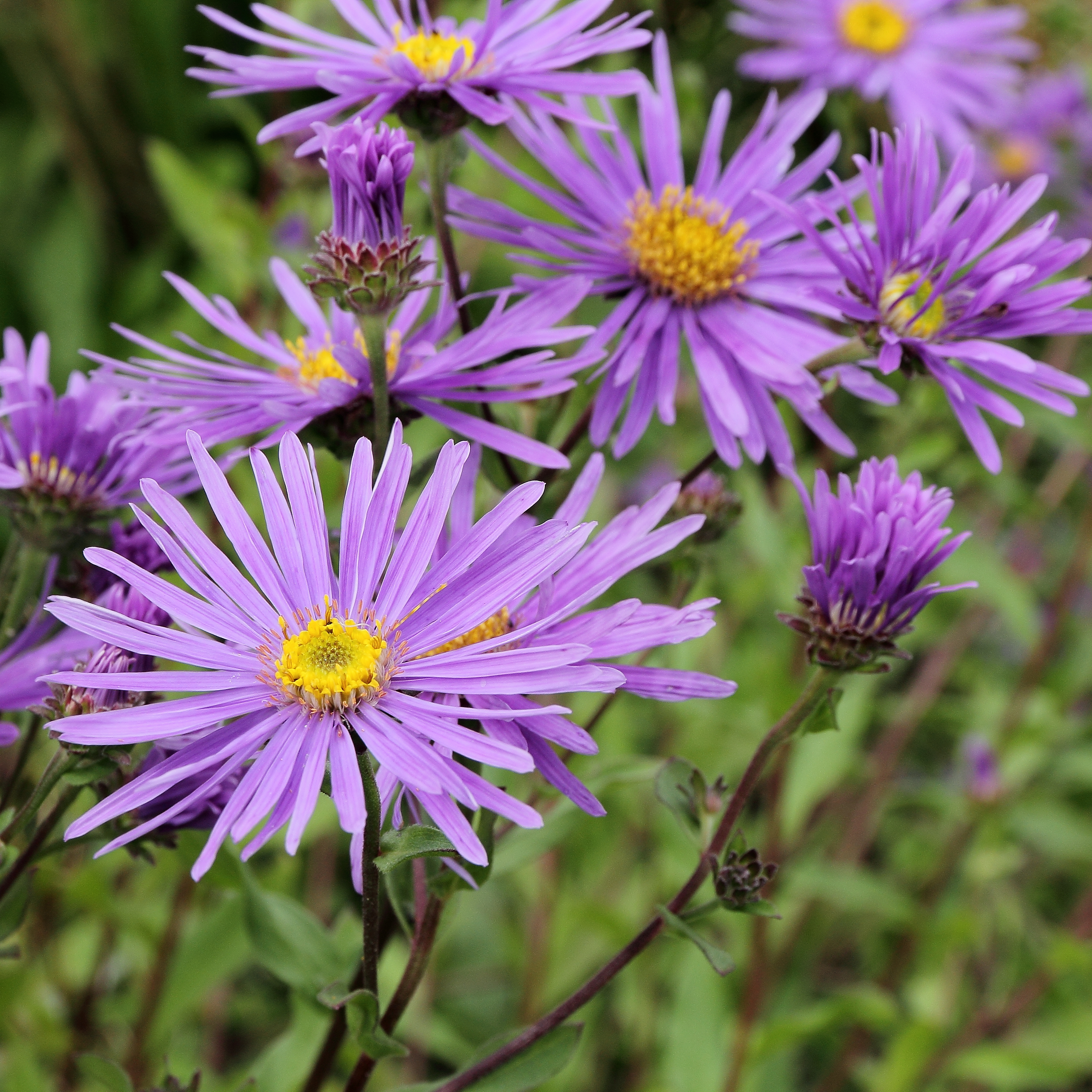 Aster amellus i Västerås botaniska trädgård.